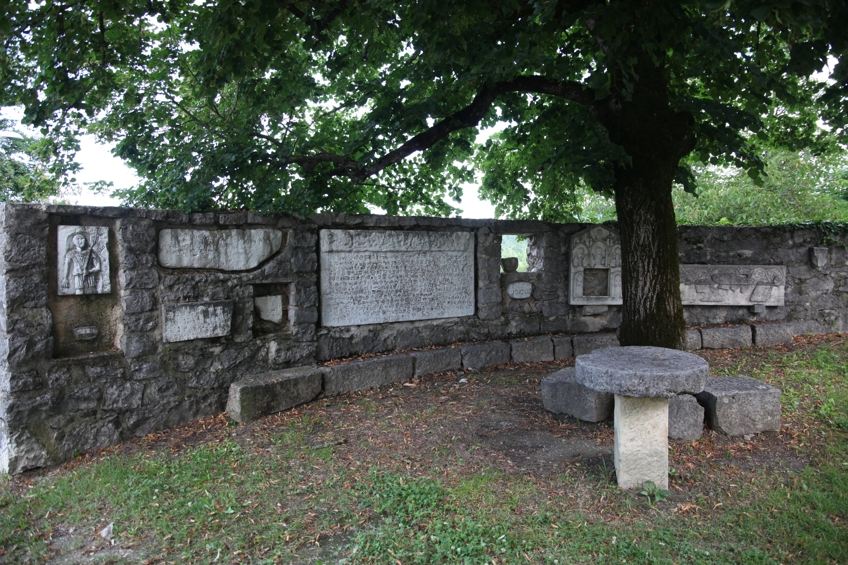 Glagolitische Lapidarium. eine Mauer im Dorf Brnobići in Kroatien.